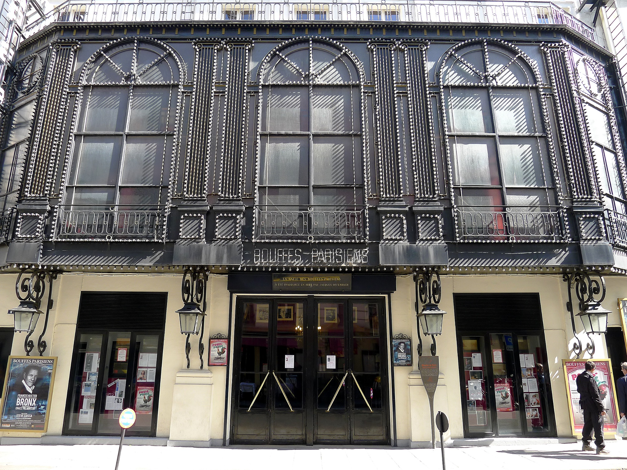 Théâtre des Bouffes-Parisiens, rue Monsigny - Paris II